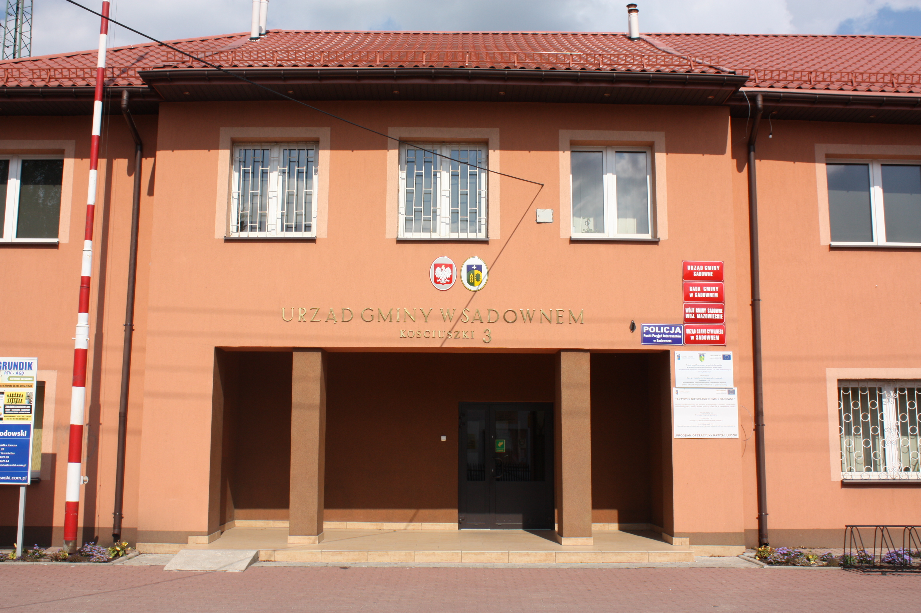 Urząd Gminy w Sadownem